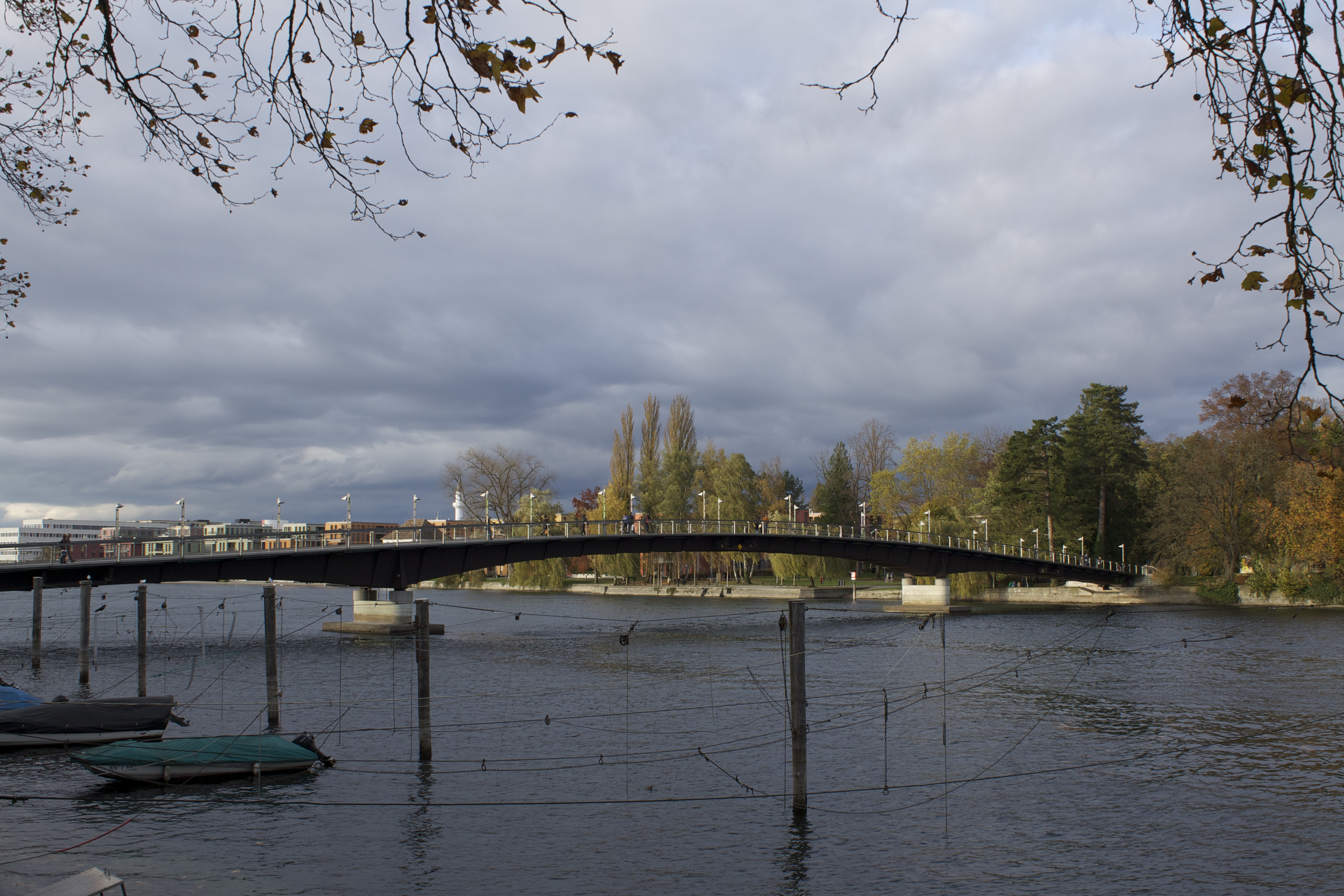 Konstanz